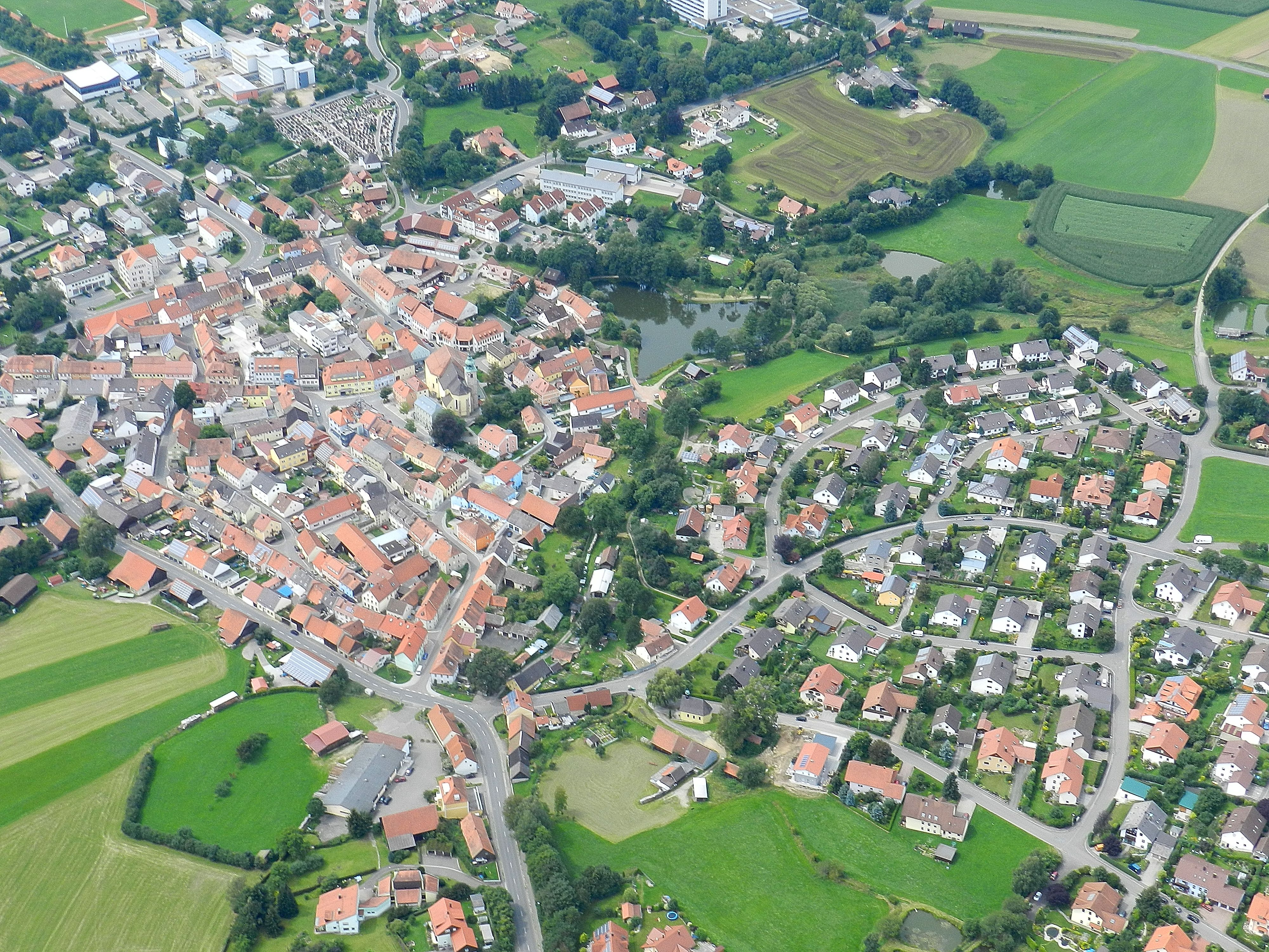 Oberviechtach, Stadtkern mit "Sandradl" (rechts); Landkreis Schwandorf, Oberpfalz, Bayern